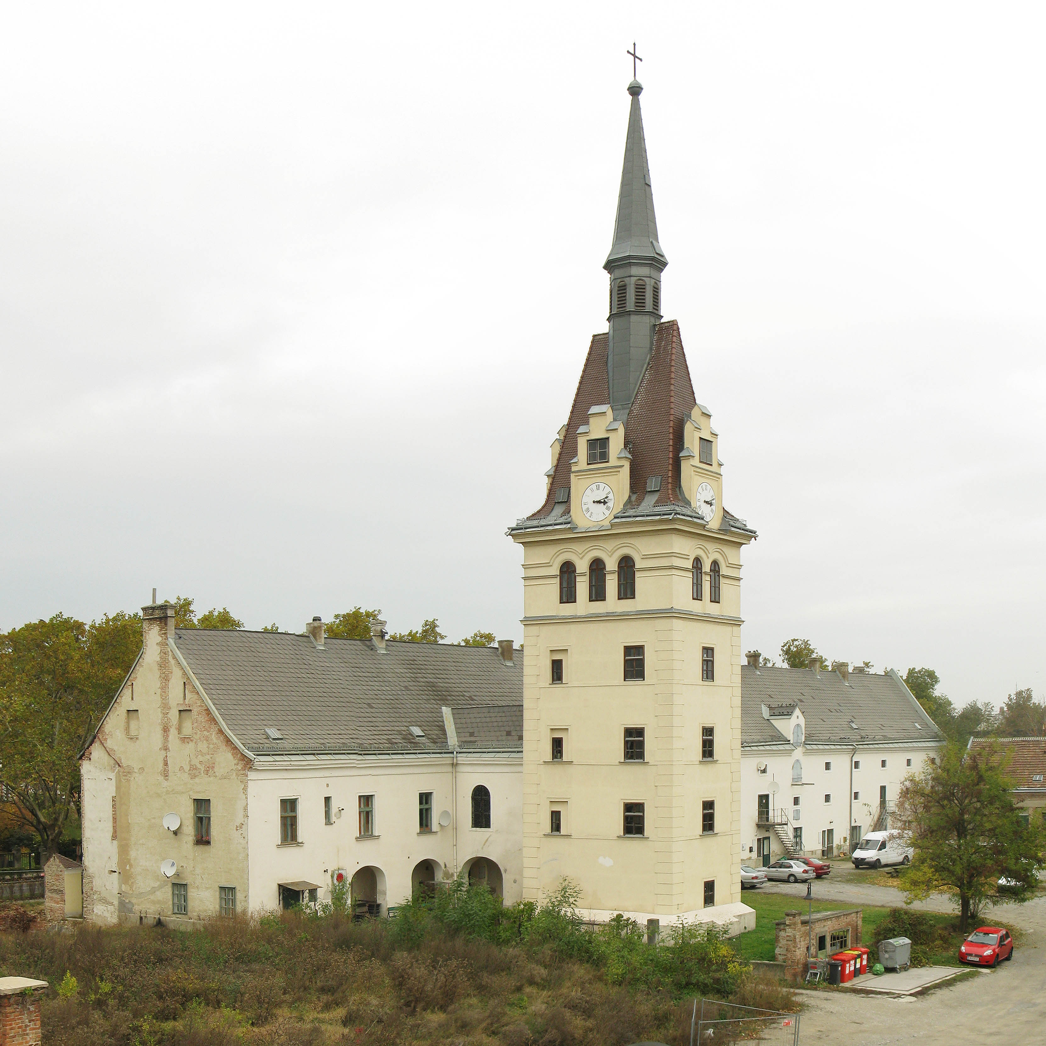 Der seit dem 12. Jahrhundert in Rannersdorf bei Schwechat bestehende Wallhof.